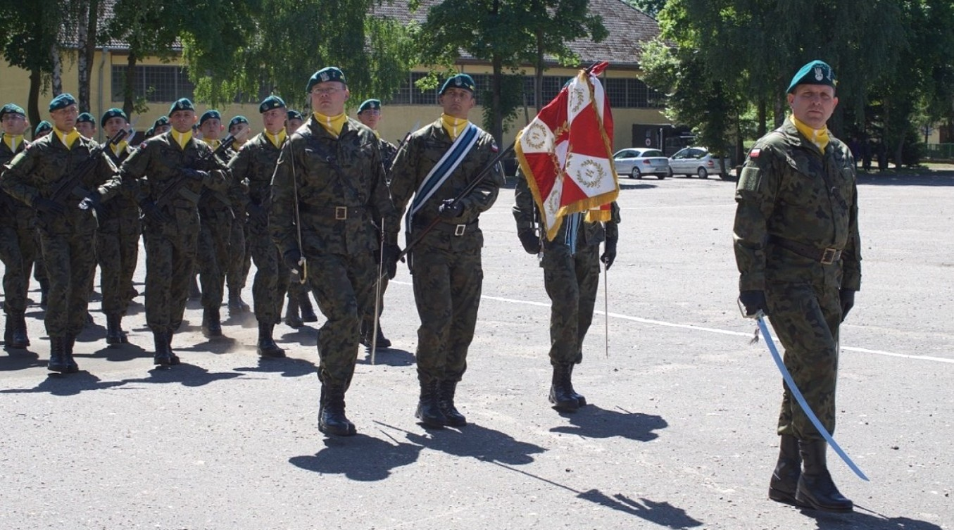 kpt./mjr Maciej Paul